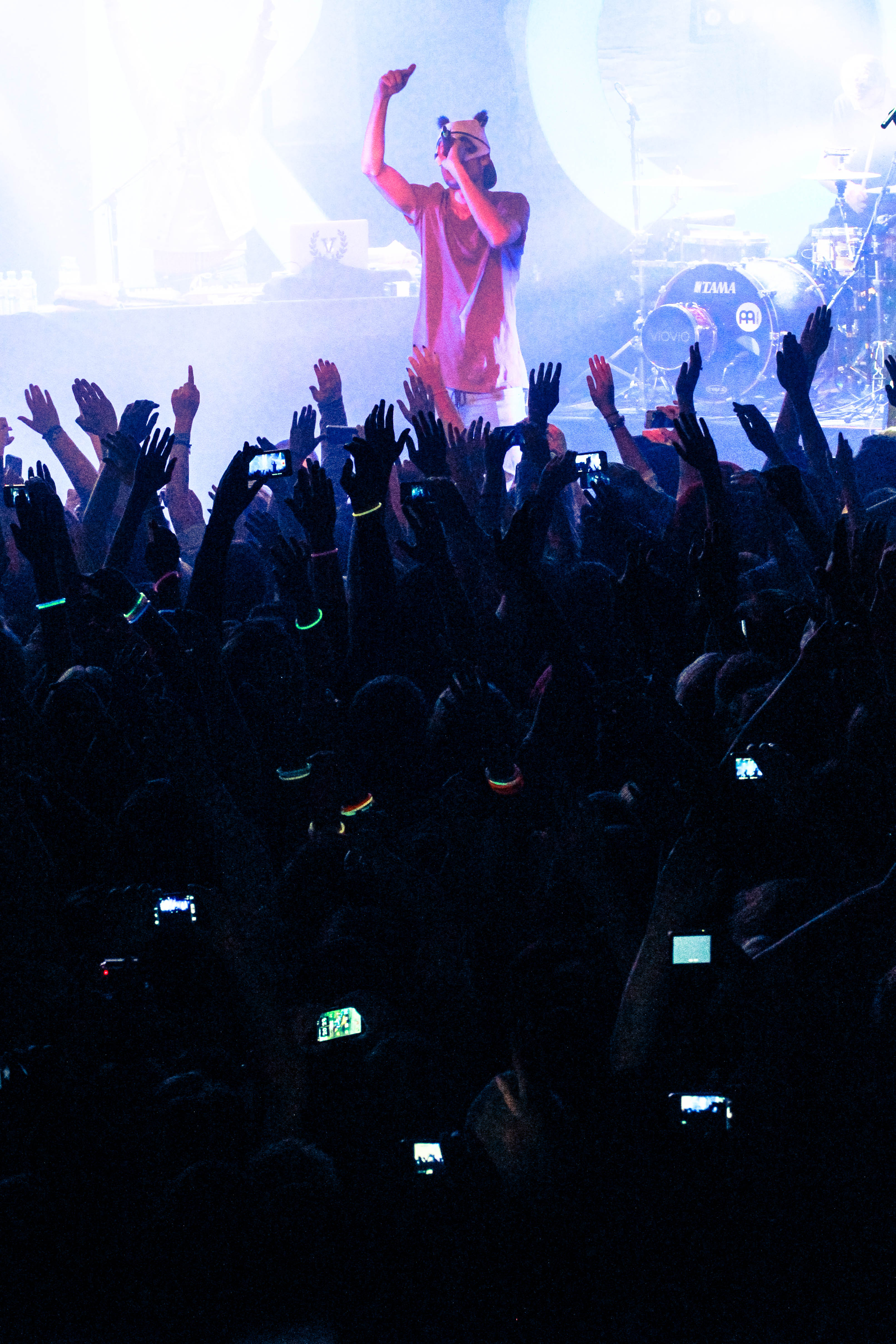 Cro im Rockhouse Salzburg